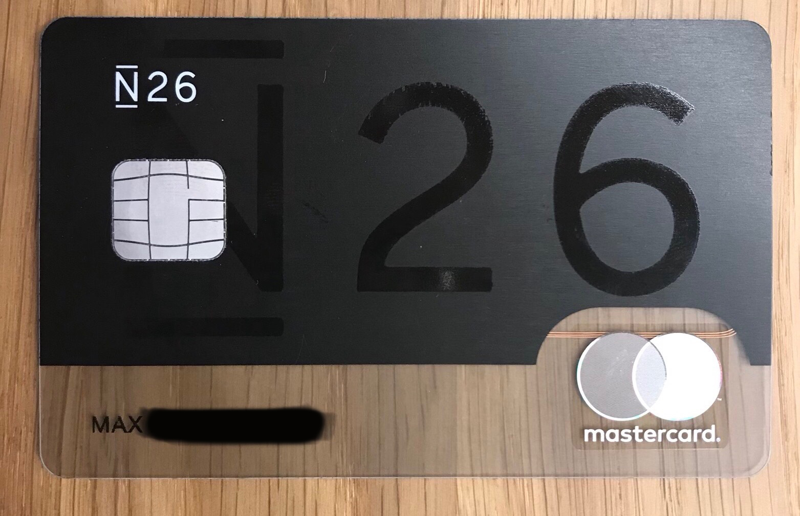 N26 premium debit card